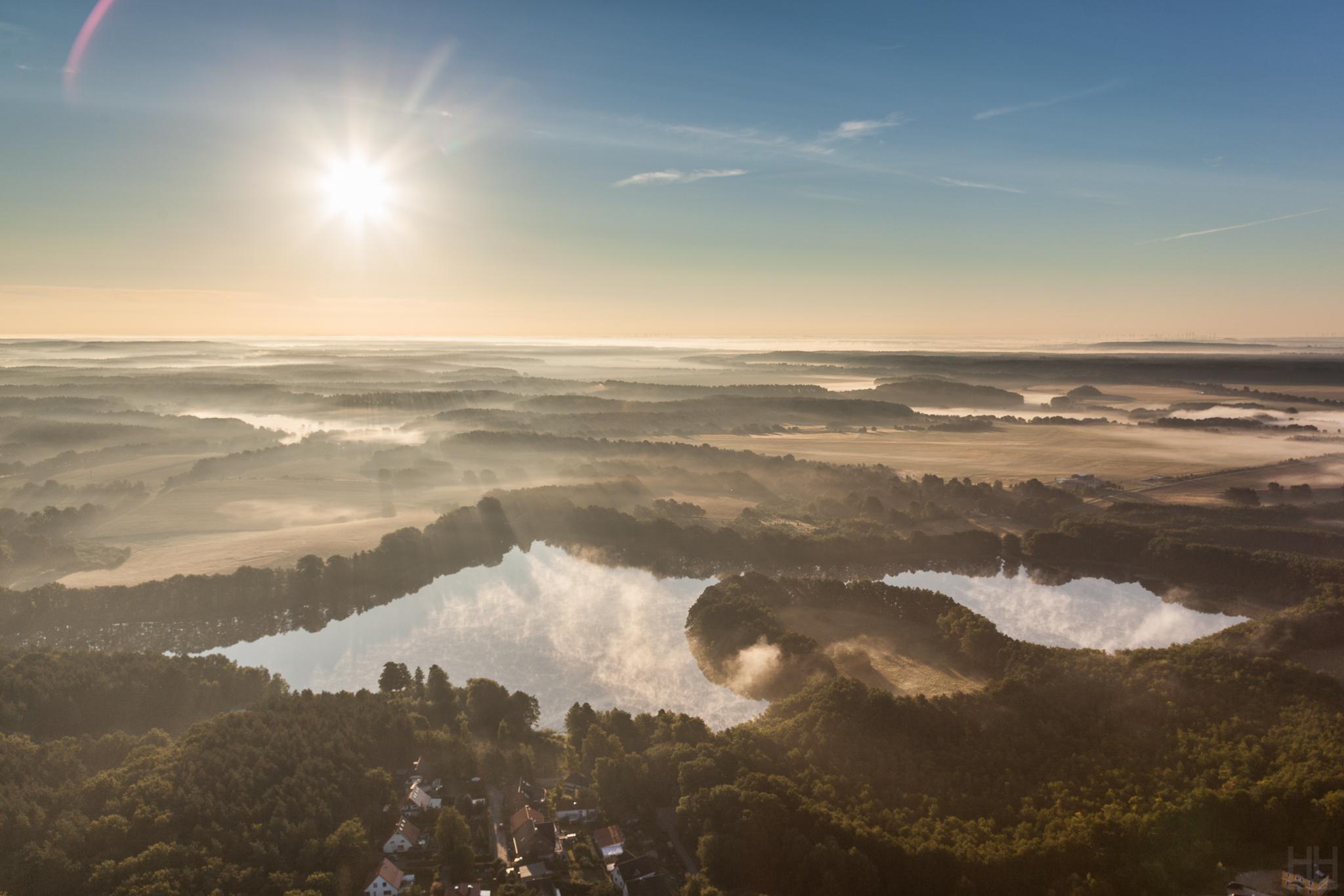 Mühlensee, Godern, Mecklenburg-Vorpommern, Germany